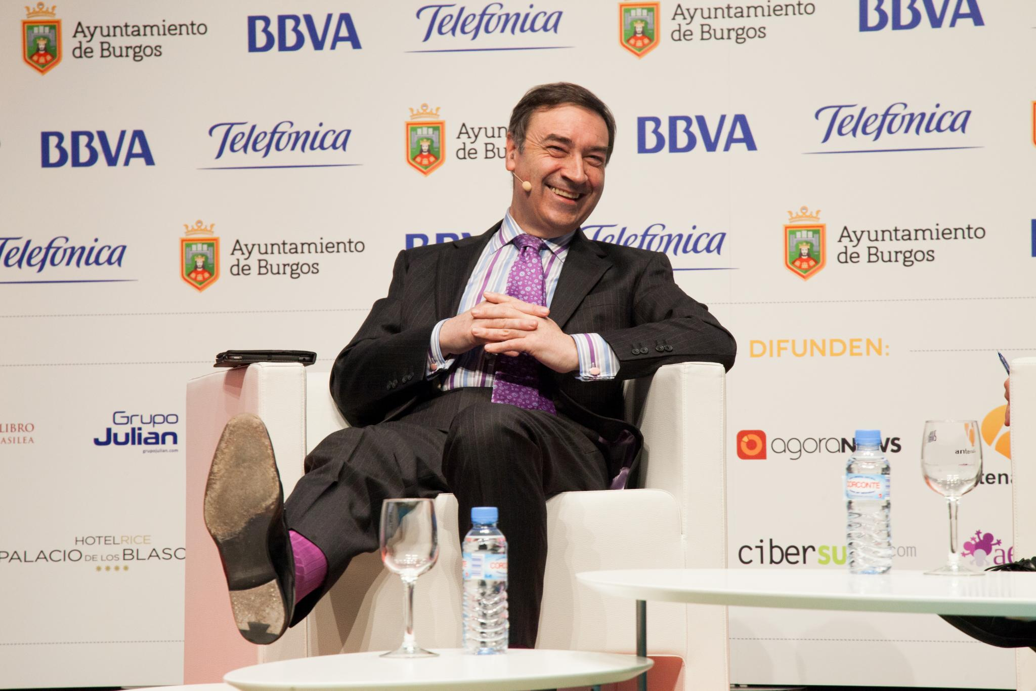 fotos por Victoriano Izquierdo ( @victorianoi )